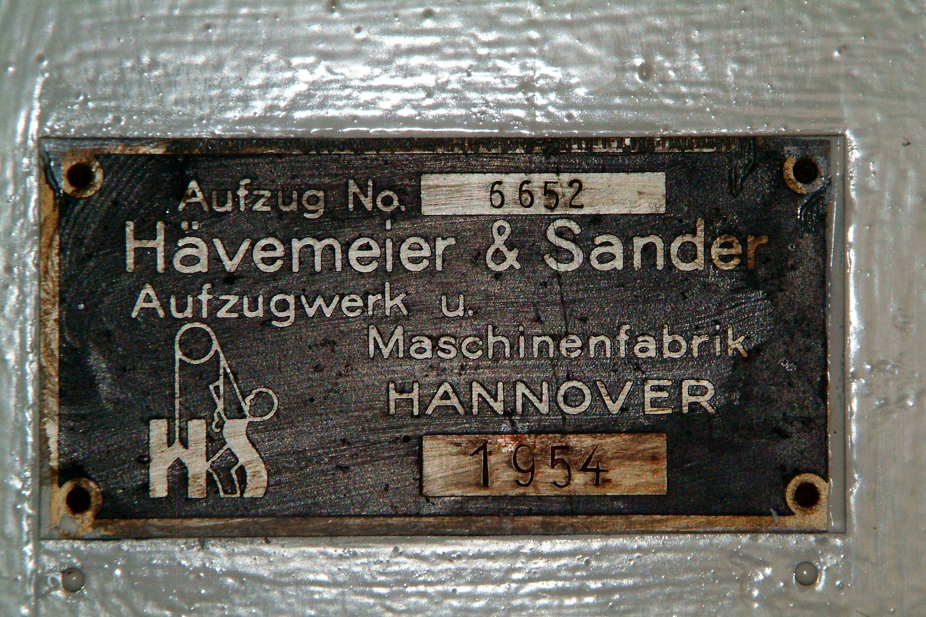 Im Gebäude Helmkestraße 5A in Hannover-Hainholz baute der ehemalige Fahrstuhlproduzent Hävemeier & Sander, Aufzugwerk und Maschinenfabrik, 1954 den Aufzug mit der Nummer "6652" ein ...